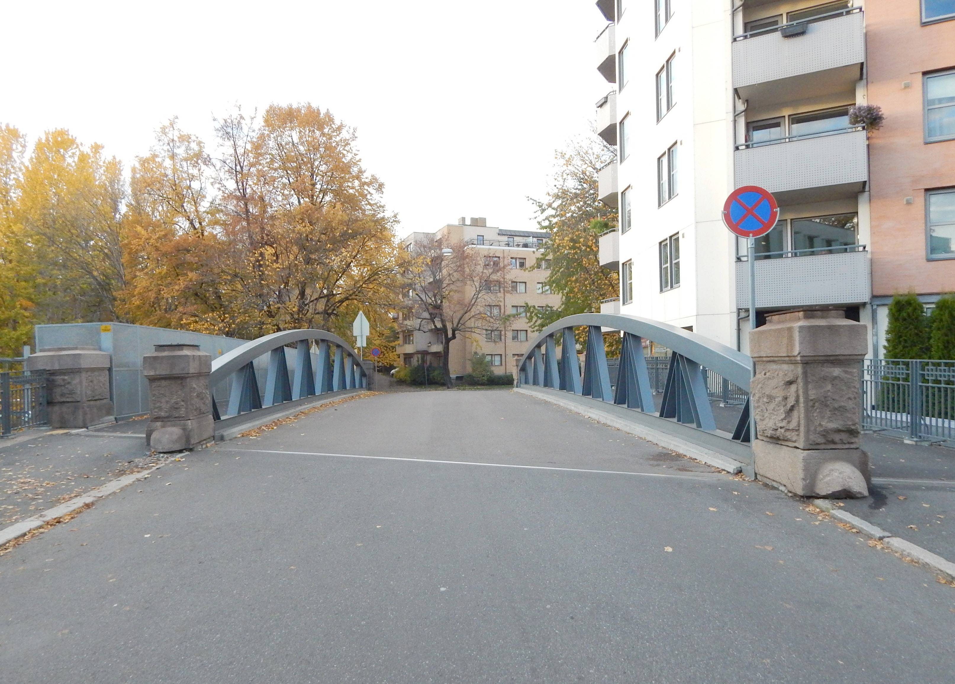 Munkedamsveien på jernbanebro der Skøyen-Filipstadlinjen ender